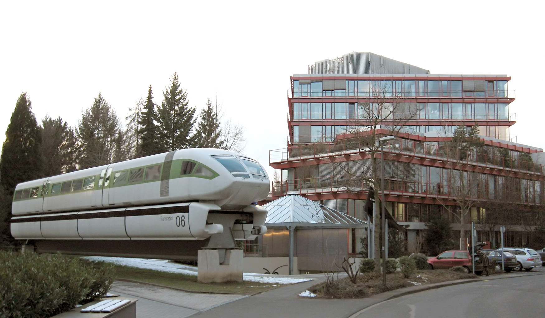 Deutsches Museum Bonn mit davor abgestelltem Transrapid Ahrstrasse, Bonn, Germany